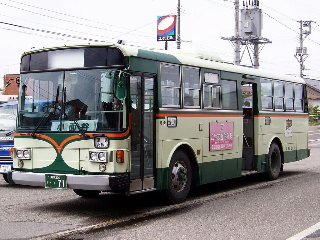 Kamtetsu Kogata Bus Nissan Diesel P-U32L at Muramatsu Bus Terminal